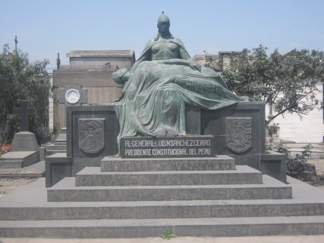 Tumba Luis Sanchez Cerro